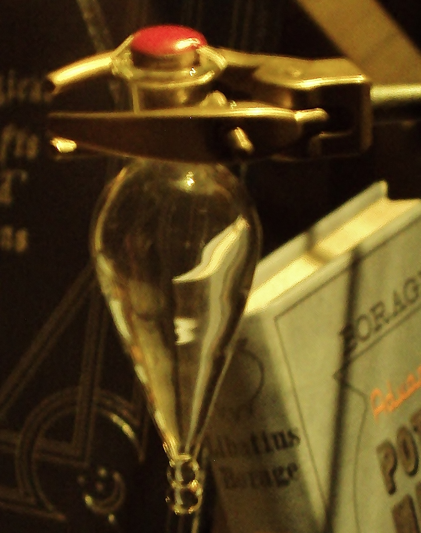 Flesje Felix Fortunatis (Engels: Felix Felicis) tijdens Harry Potter: The Exhibition in Brussel (België)